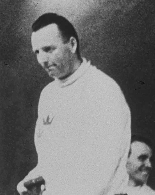 Bengt Ljungquist